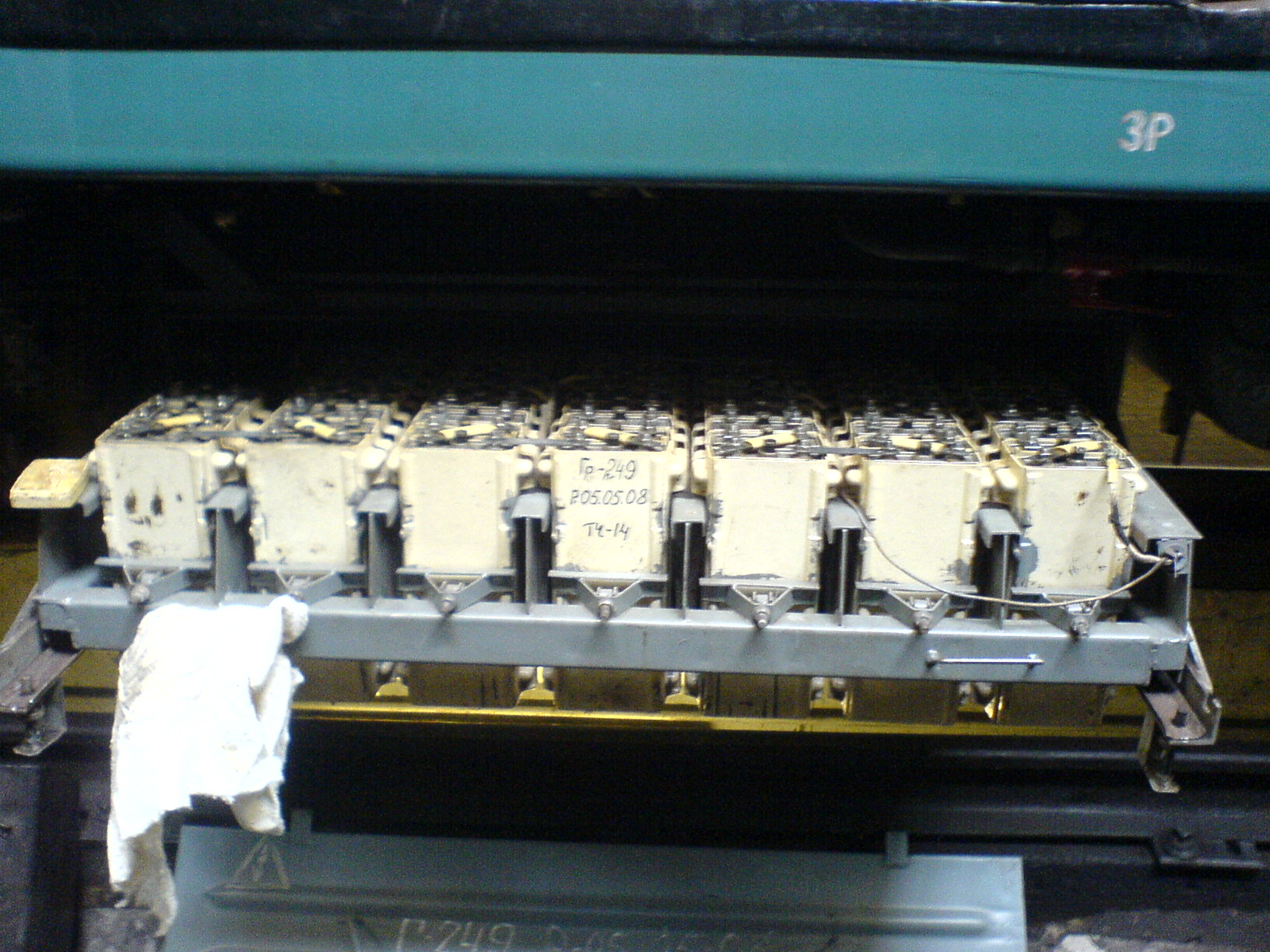 Аккумуляторная батарея из элементов НК-80 на вагоне 81-714 (выдвинута на обслуживание)